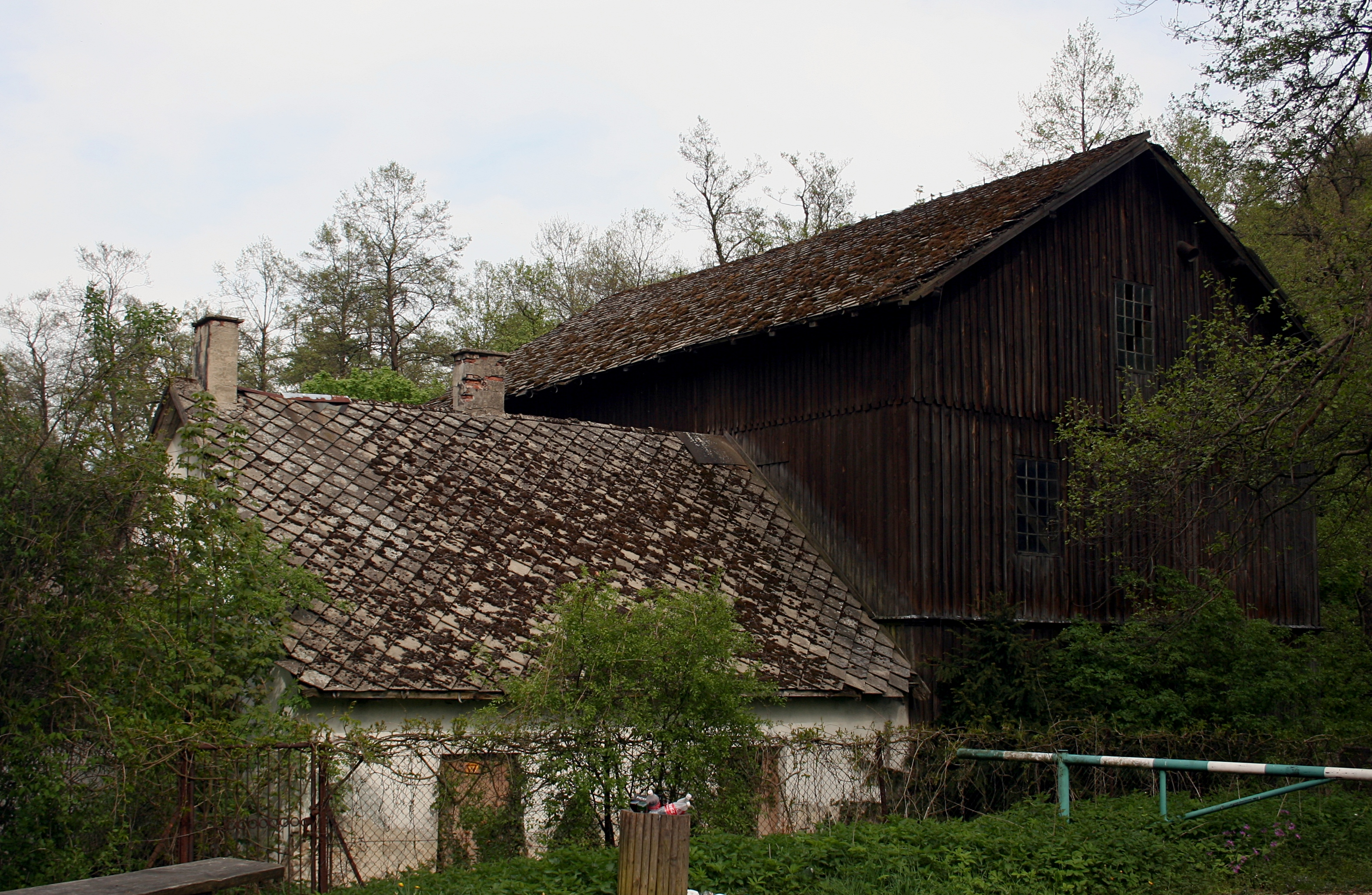 Młyn wodny Kołaczew na terenie rezerwatu przyrody Parkowe. Obiekt położony jest na szlaku architektury drewnianej